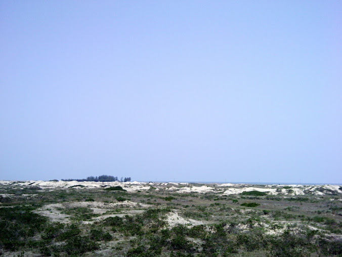 Vista das dunas do Araçá.